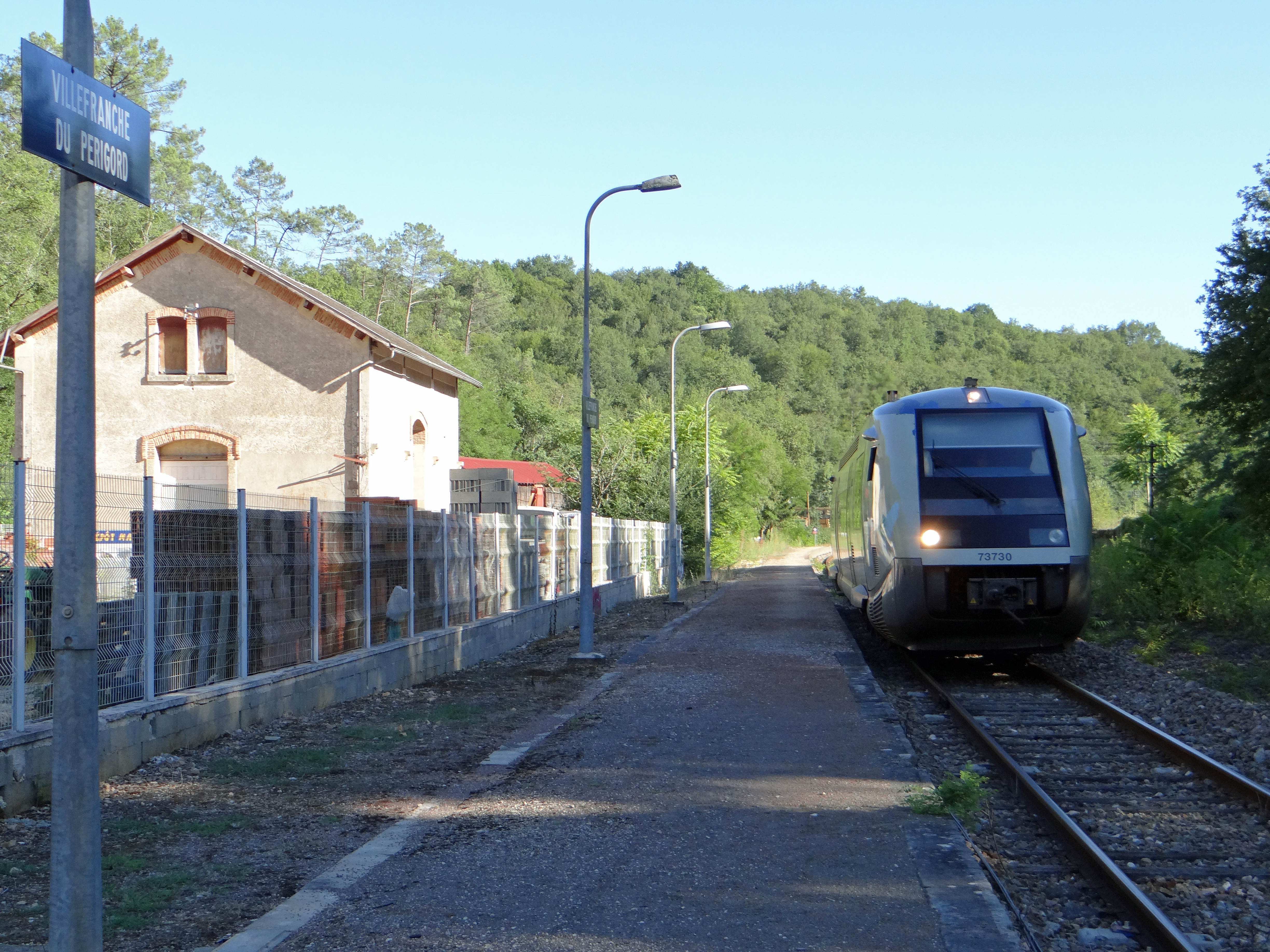 Villefranche-du-Périgord - Entrée du train en gare